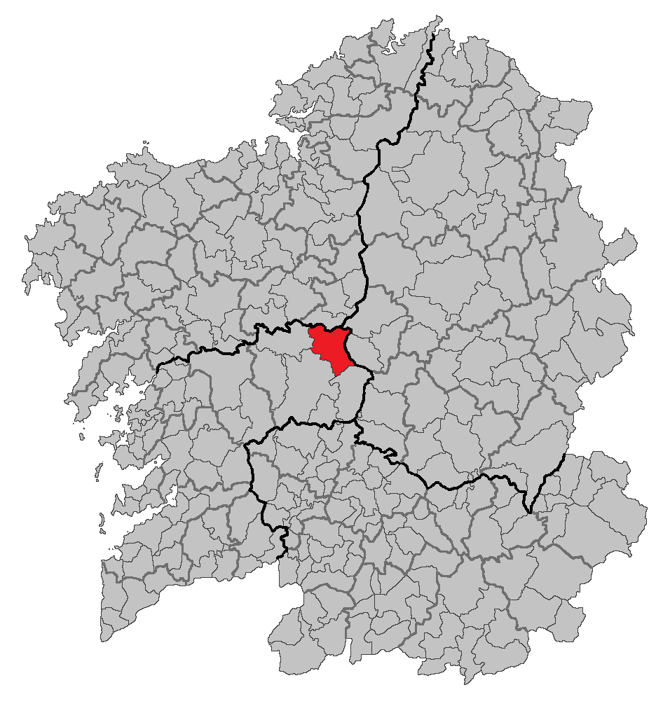 Mapa coa localización do concello de Agolada.